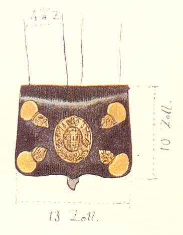 Kartusche (Patronentasche) des preuß. Regiments von Schwerin